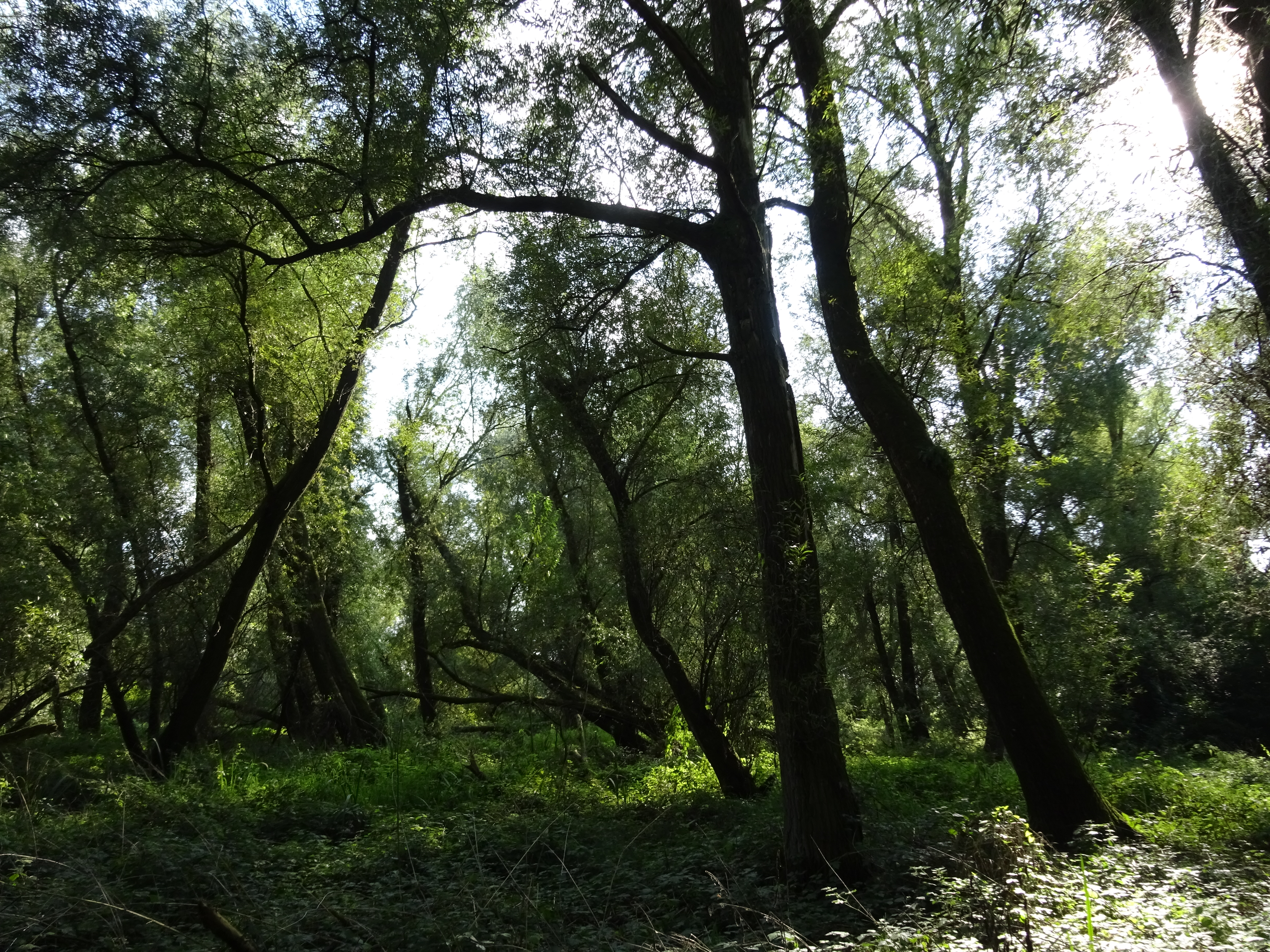 Gelderse Poort, uiterwaard met beverbos bij Bemmel